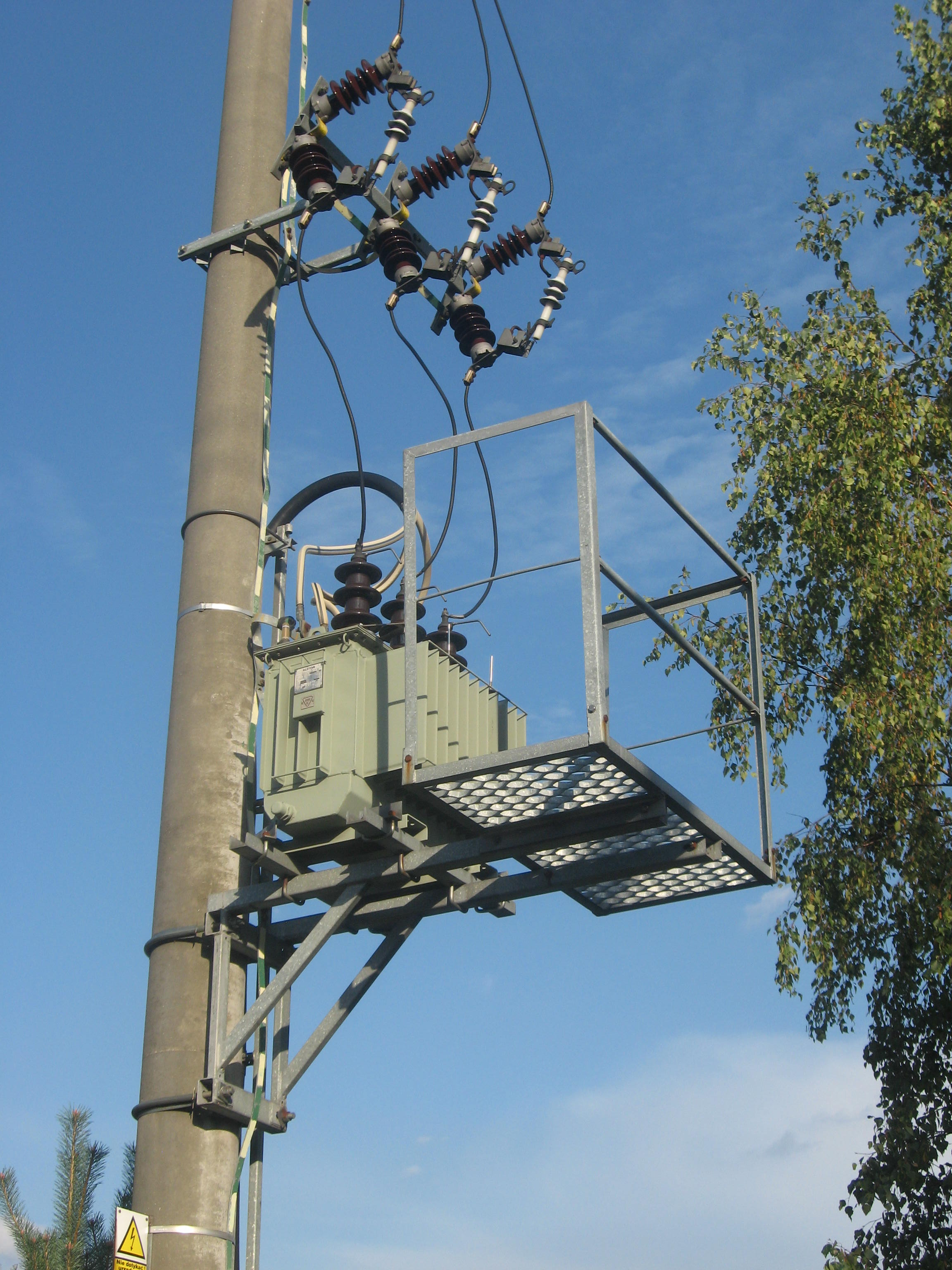 Transformator rozdzielczy 15 kV/0,4 kV we wsi Marianów koło Leszna